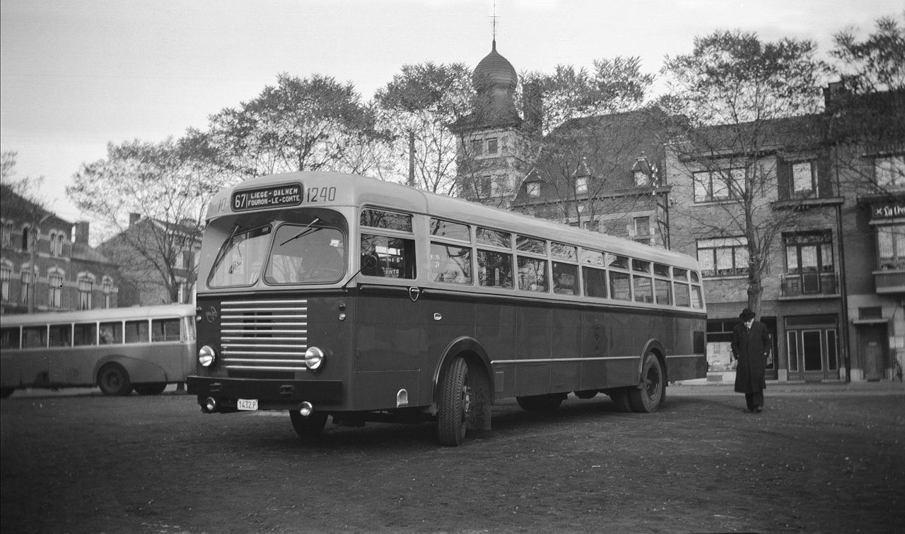 Autobus Brossel A93 DAR n°1201 (série 1184-1236) de la SNCV sur la ligne 67, place Reine Astrid à Visé.